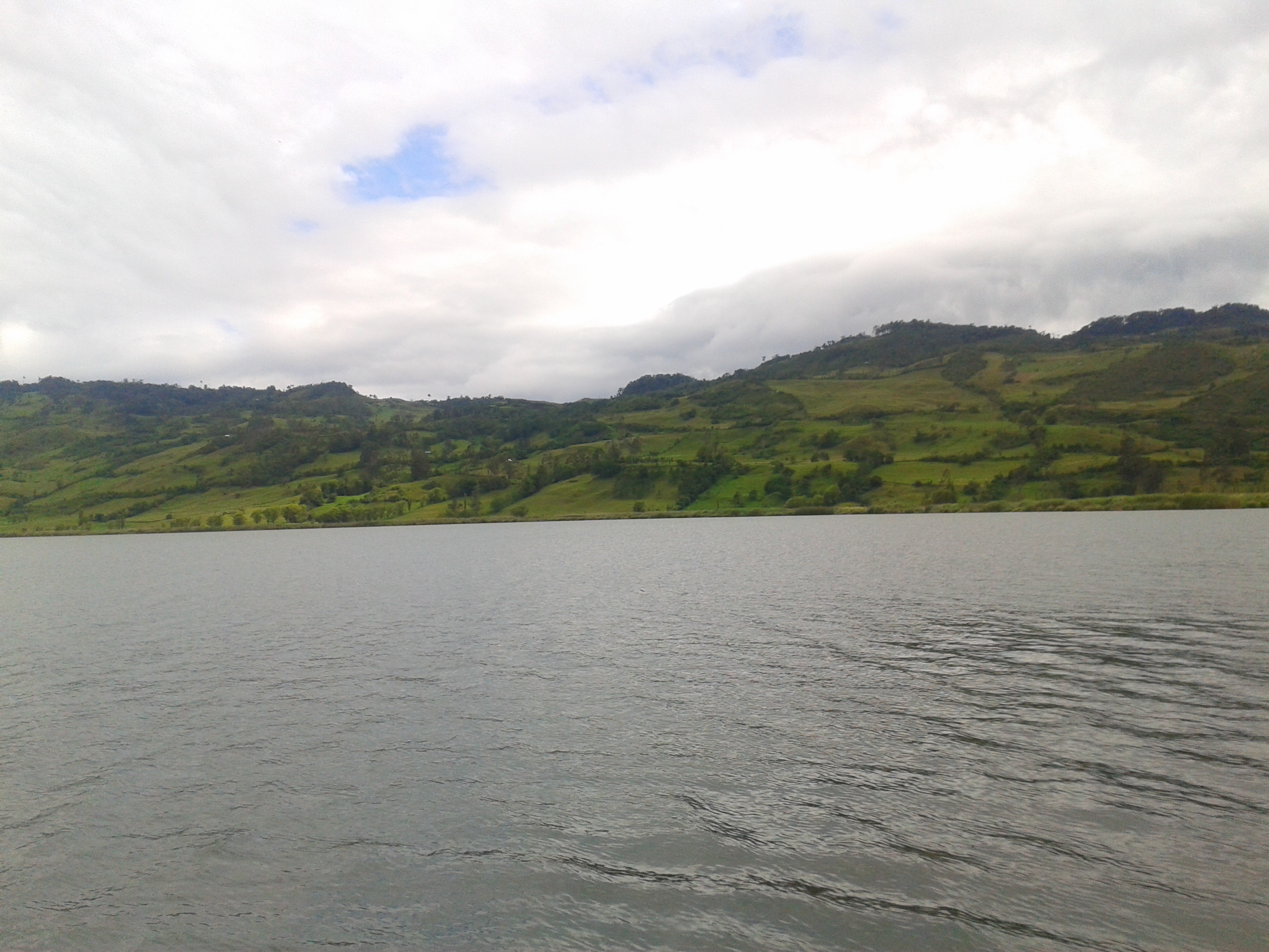 Vista de la laguna desde el puerto